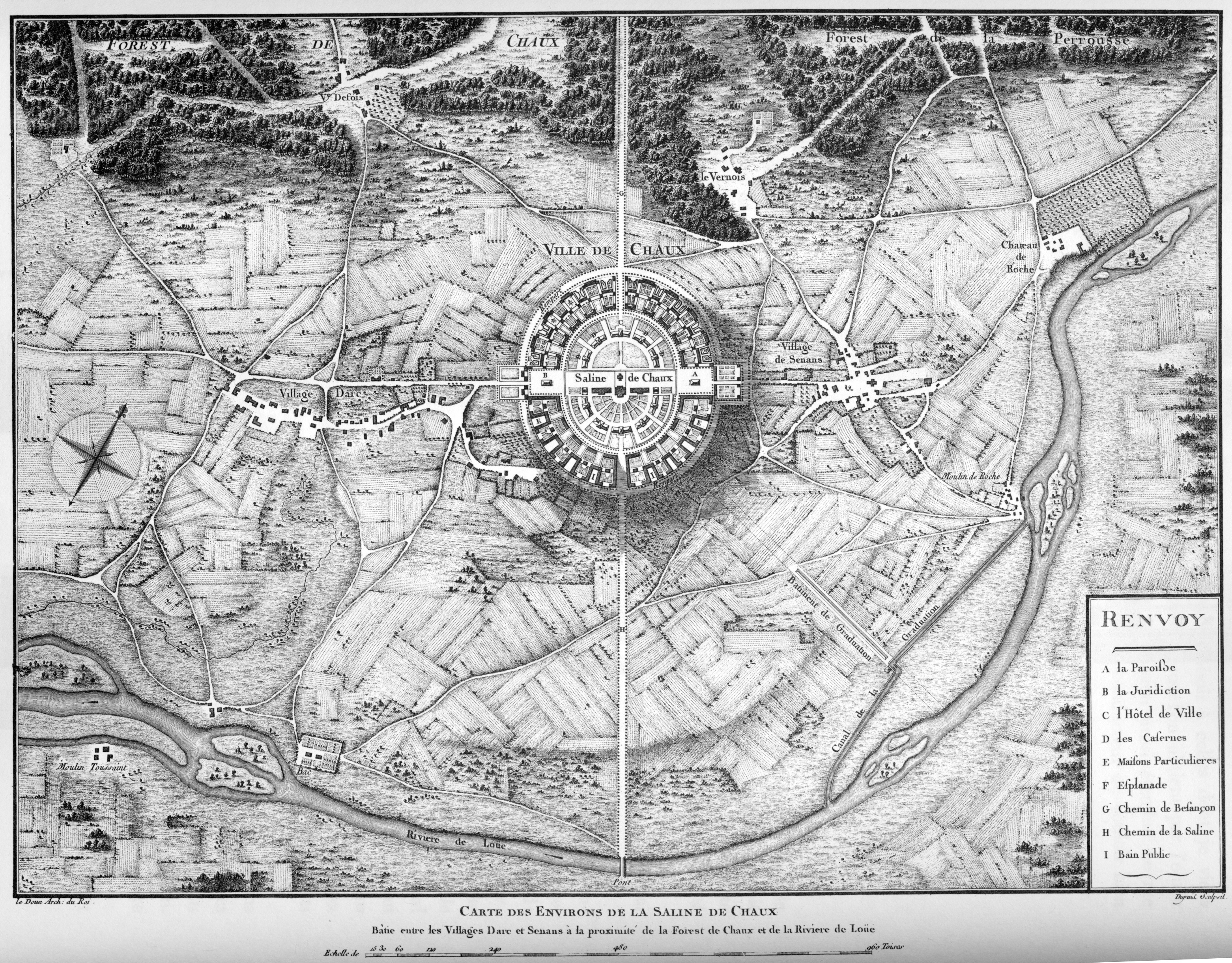 Carte générale des environs de la Saline de Chaux – Plan de la saline. Le bâtiment de graduation et le canal y sont figurés au sud-est de celle-ci.